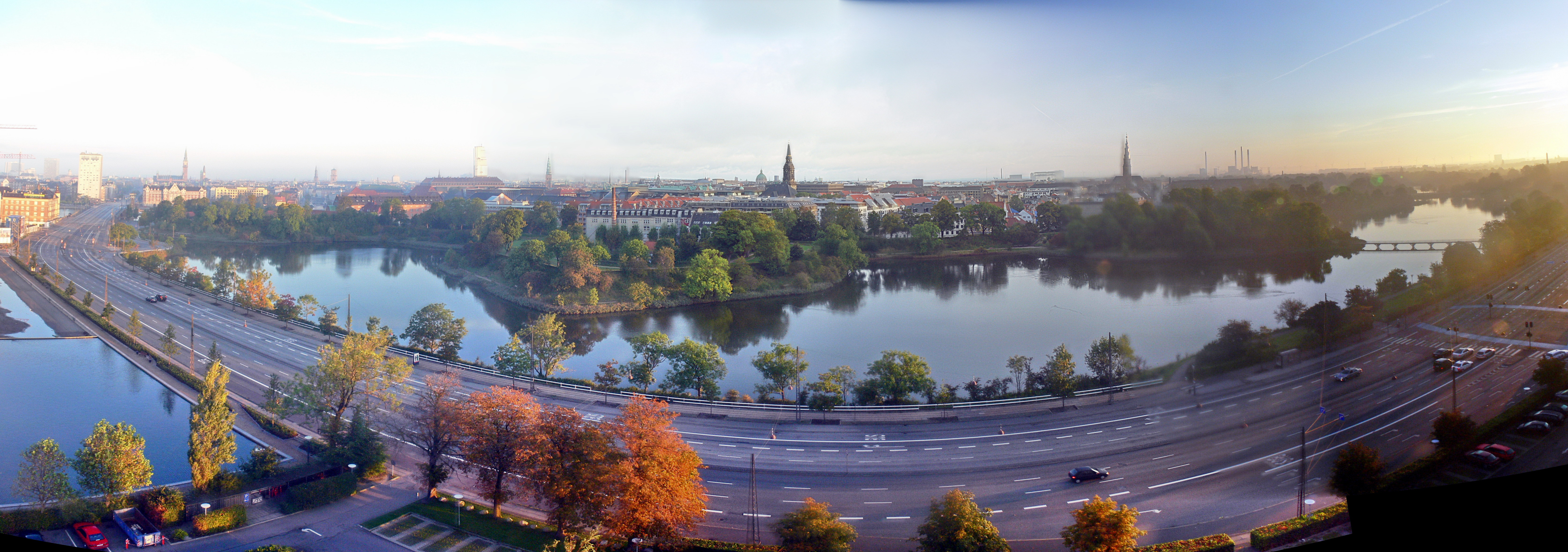 Kopenhagen. Überblick aus dem SAS Radisson Hotel